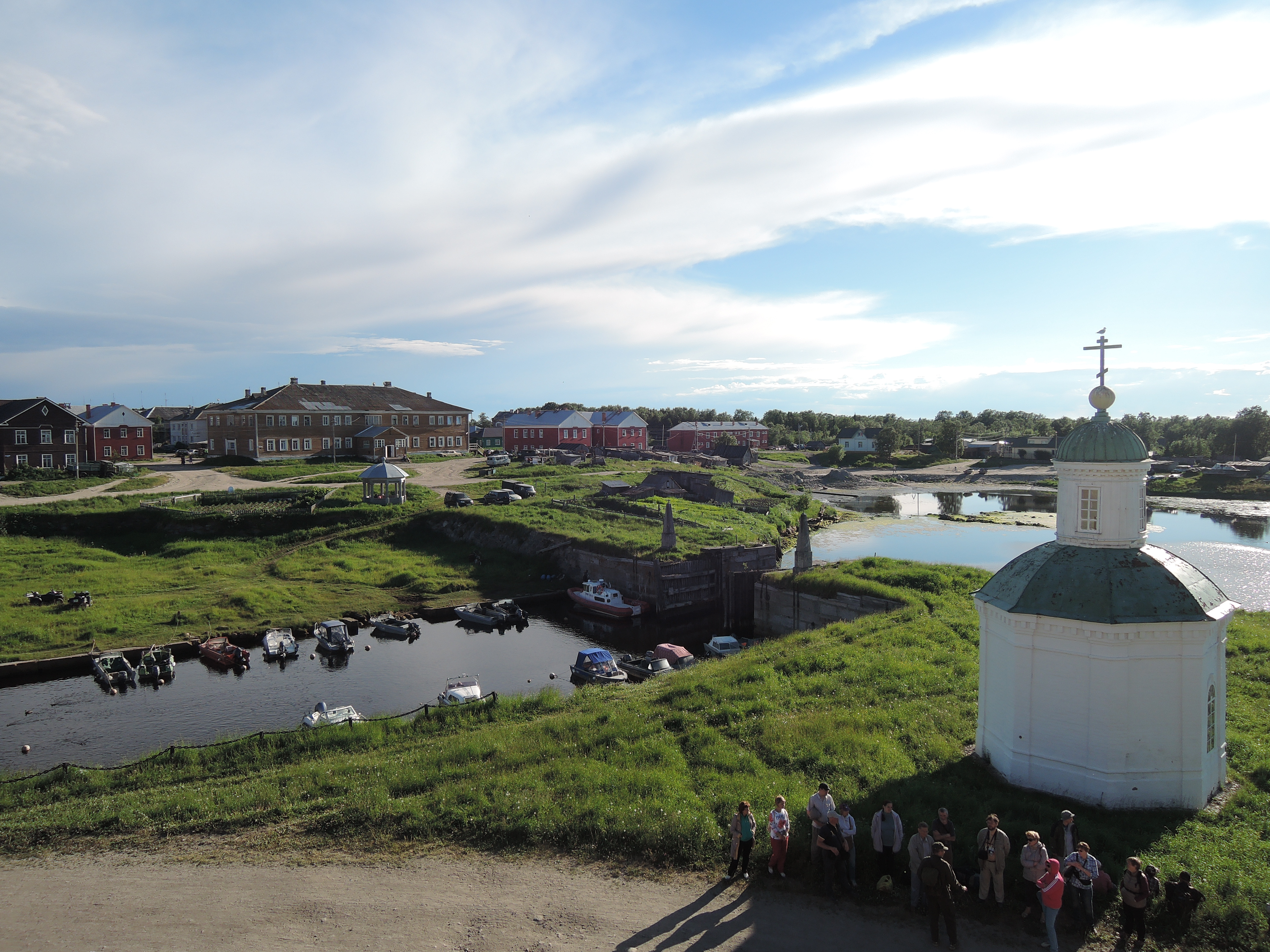 Pohled na vesnici Soloveckij z Přádelní věže Soloveckého kláštera